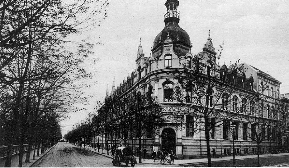 Das Haus Ecke Schützenstraße/Schenkelstraße